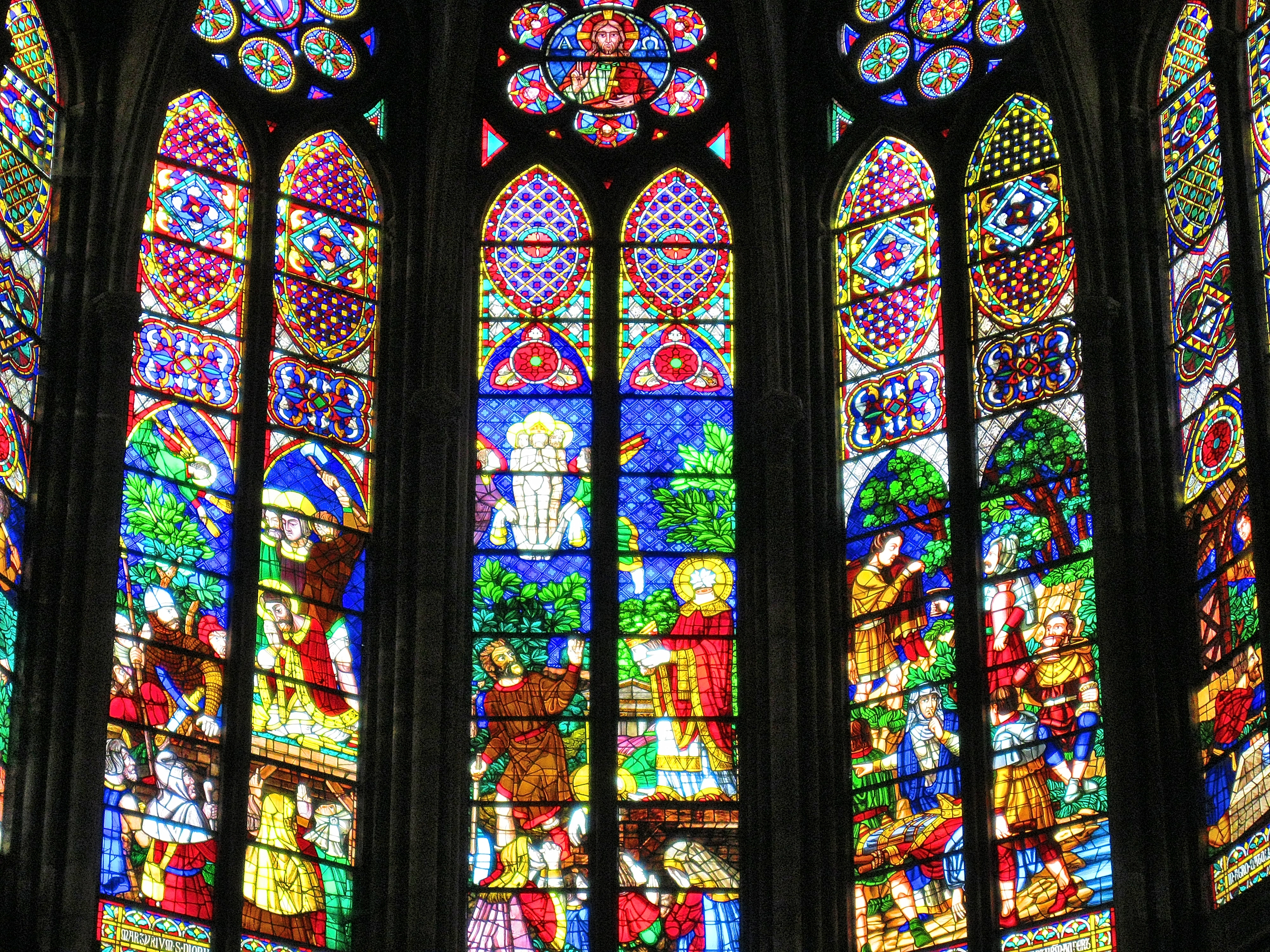 Vitraux de la basilique de Saint-Denis